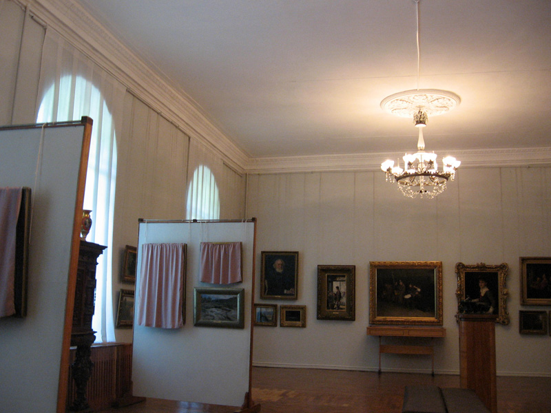 Russian hall of Kroshitskiy museum in Sevastopol